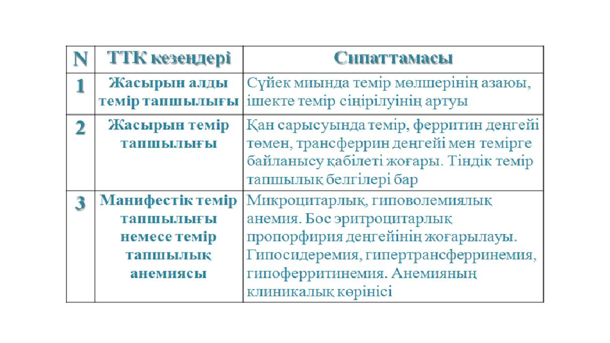 Темір тапшылық күйлердің кезеңдері